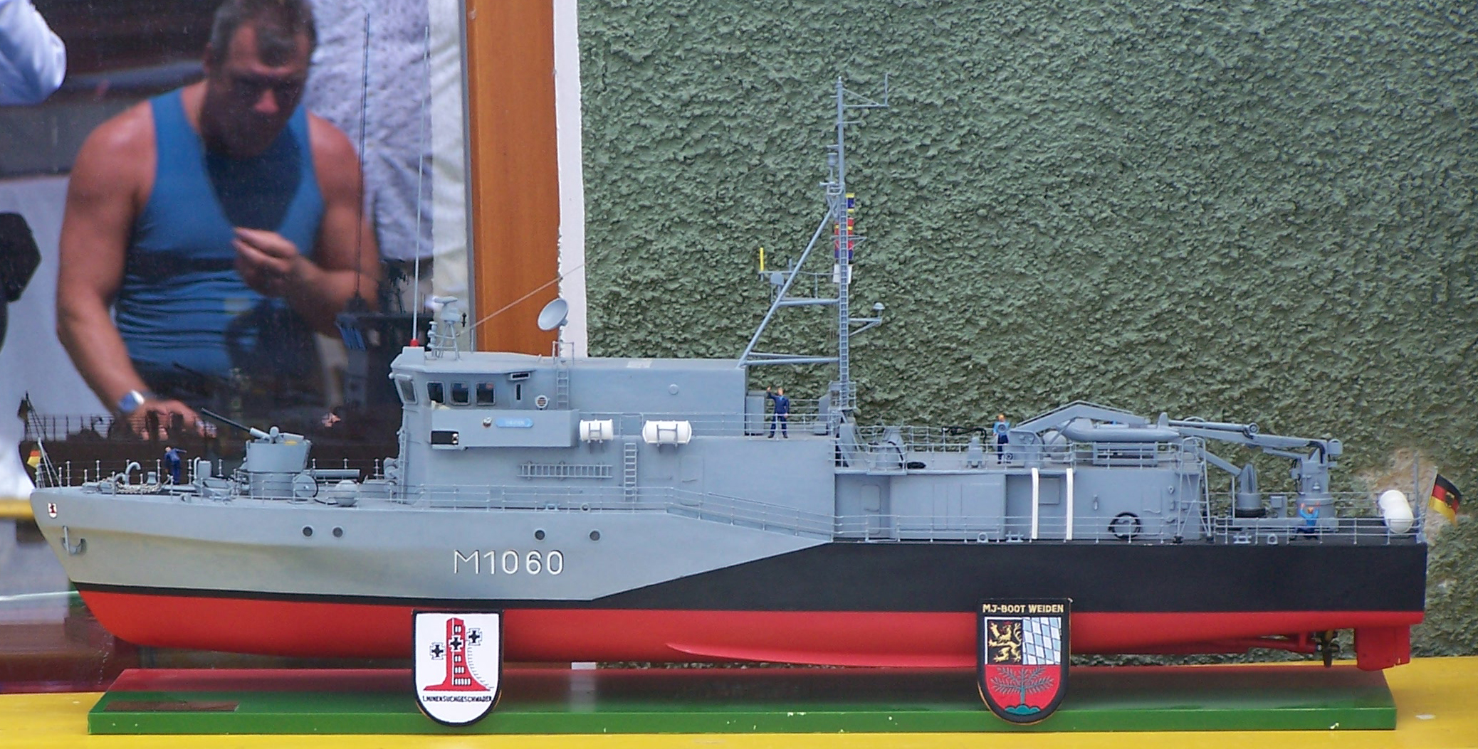 Model Minenjagdboot Weiden